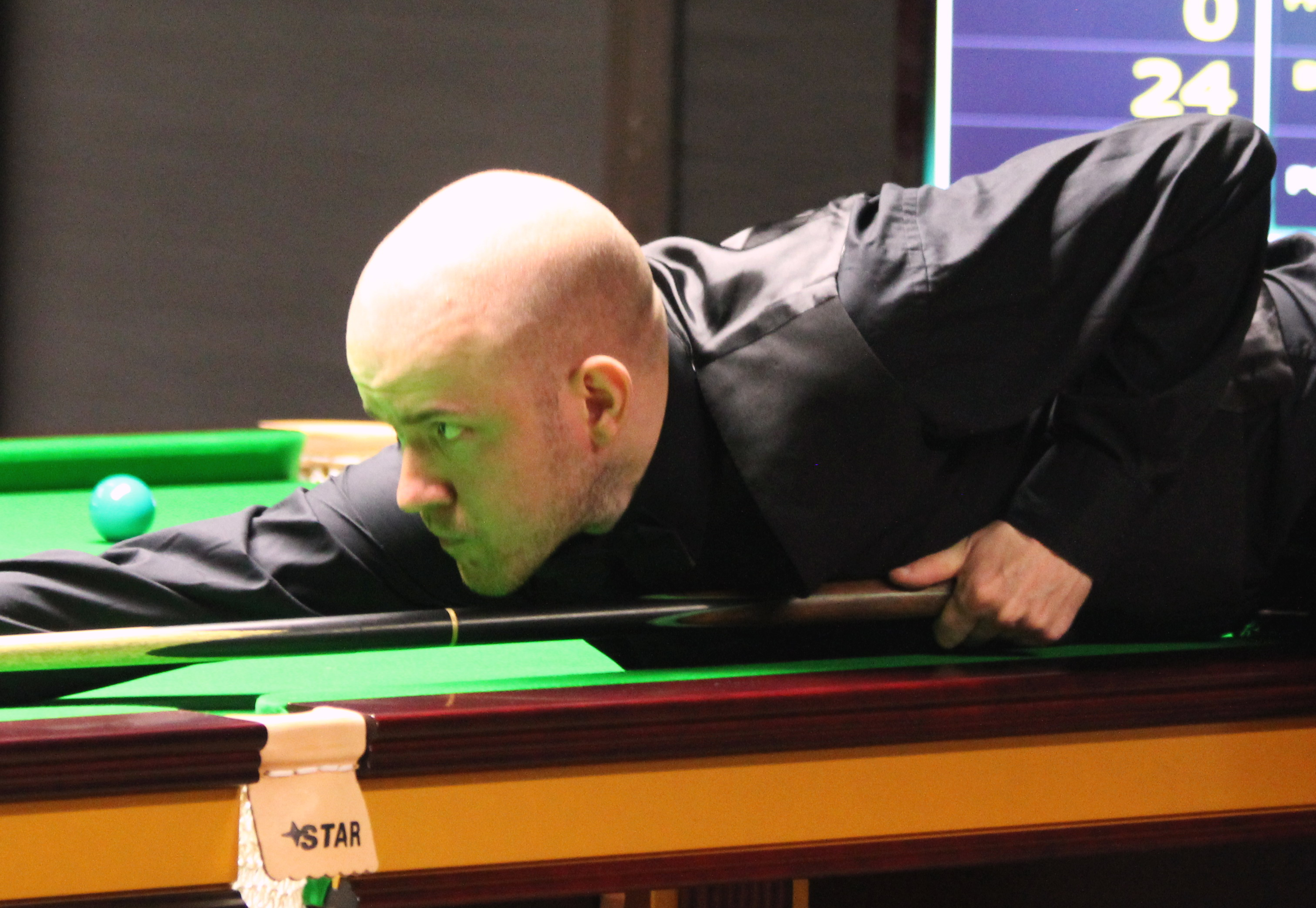 Robbie Williams beim Paul Hunter Classic 2016